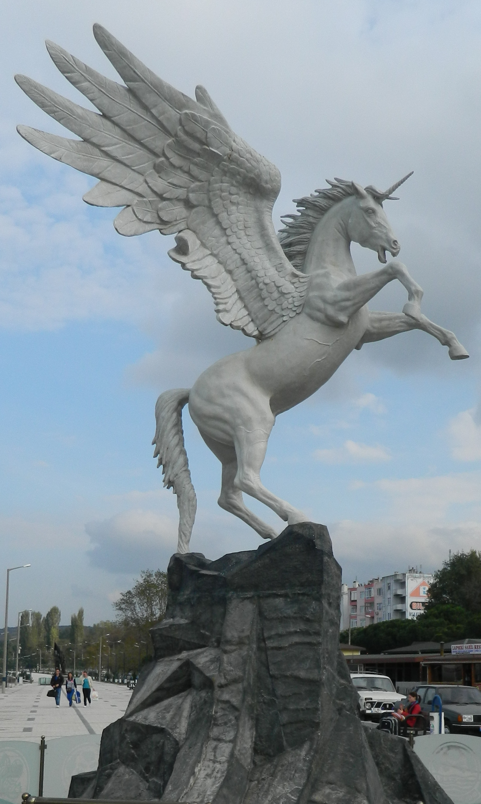 2012 yılında Lapseki Belediyesi tarafından sponsorların sağladığı destekle Heykeltraş Yüksek Mimar Pınar ÖKTEM DOĞAN’a yaptırılarak Gazi Mustafa Kemal ATATÜRK Parkı ve Meydanına kuruldu.5,5 mt. yüksekliğinde olan eserin yapımı 4 ay sürmüştür.